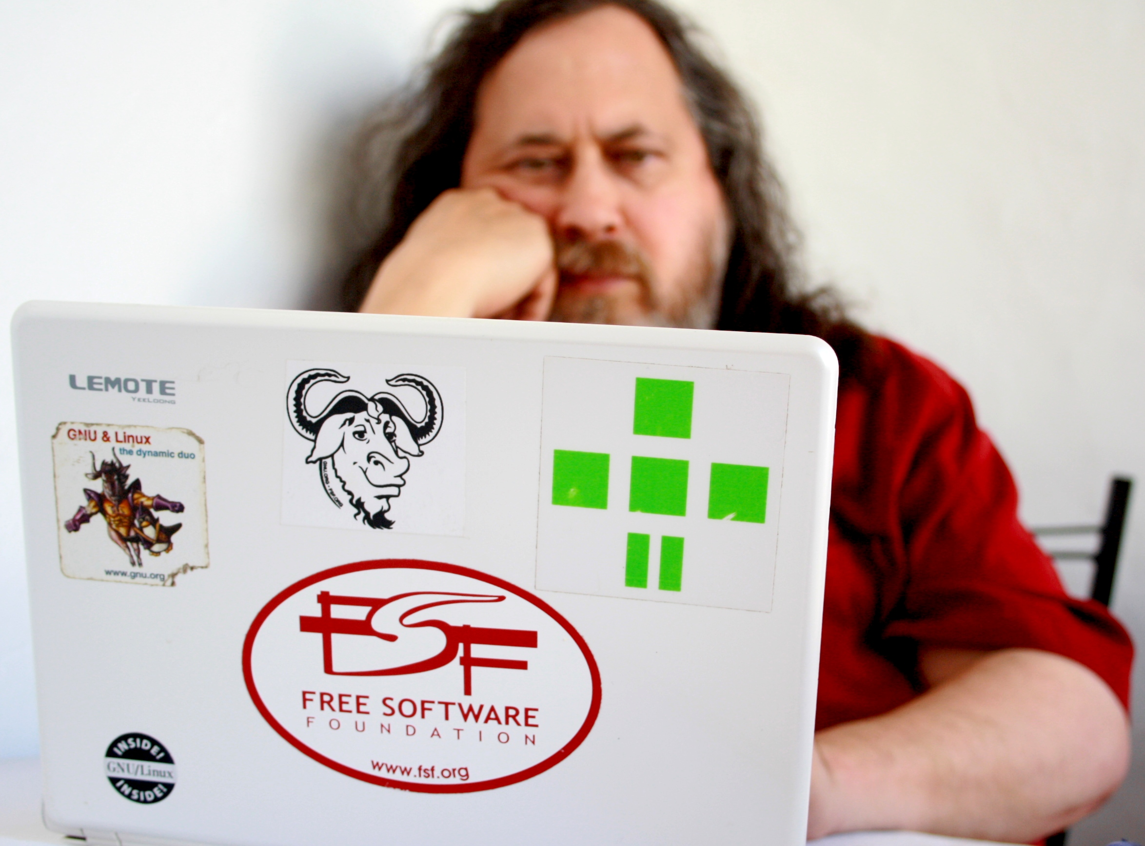 Richard M. Stallman dans un moment de réflexion devant sa machine taguée par des stickers GNU, FSF etc.